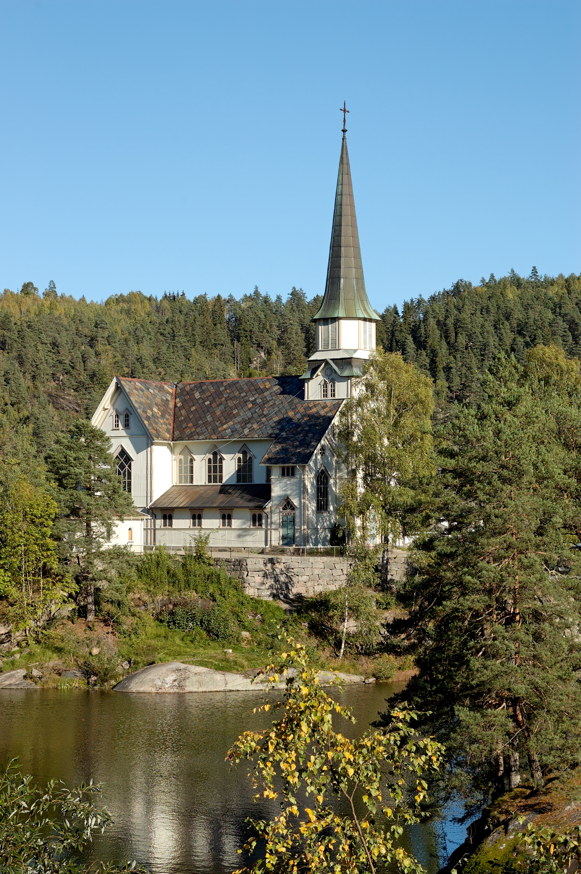 Skotfoss kyrkje i Skien i Telemark en: Skotfoss church in Skien, Telemark, Norway.